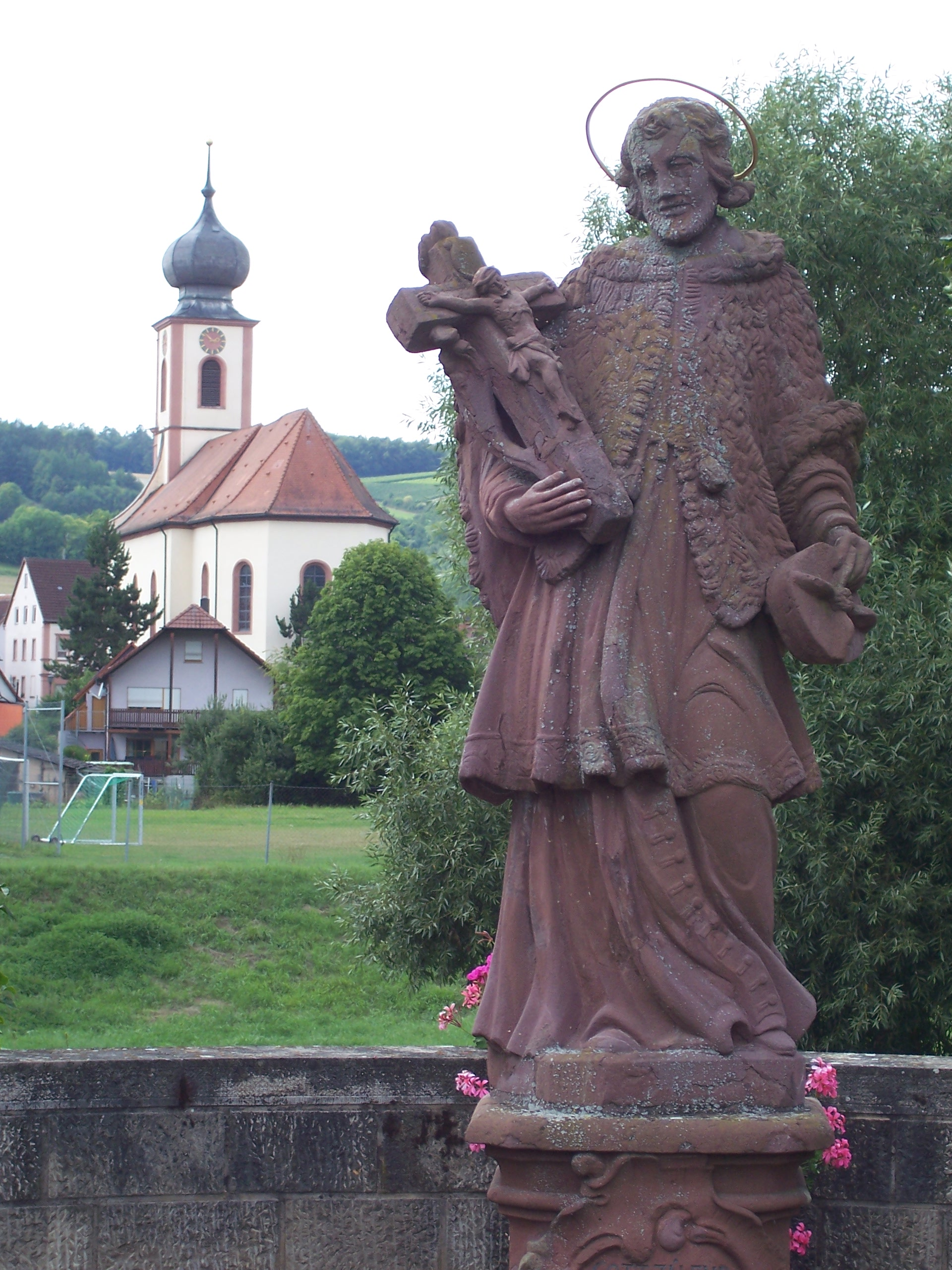 Die Statue des St. Nepomuk (1777) und Kirche St. Vitus in Dittigheim (Tauberbischofsheim), erbaut 1748-1752 nach Plänen von Balthasar Neumann